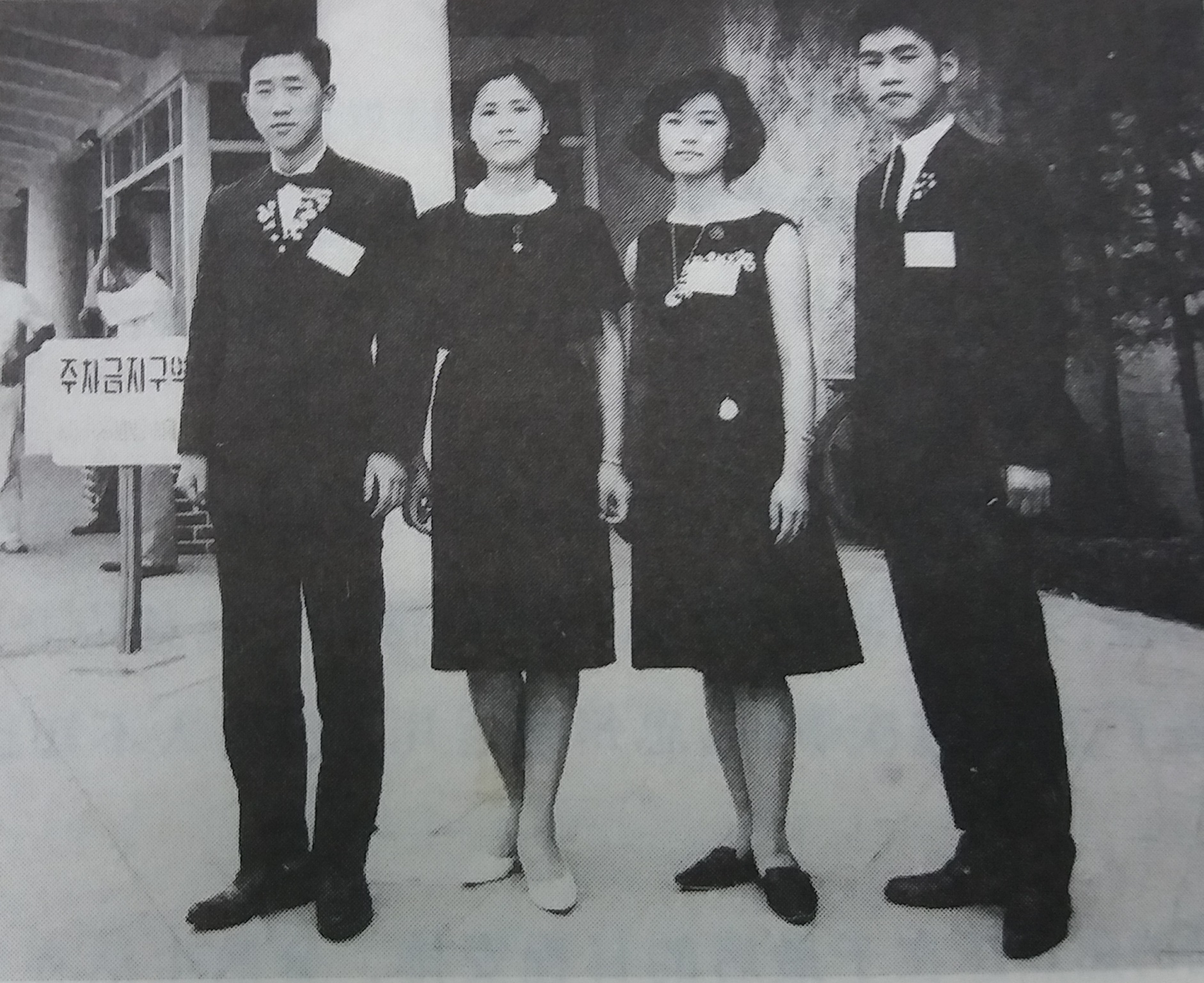 忠州高中三年纪的潘基文